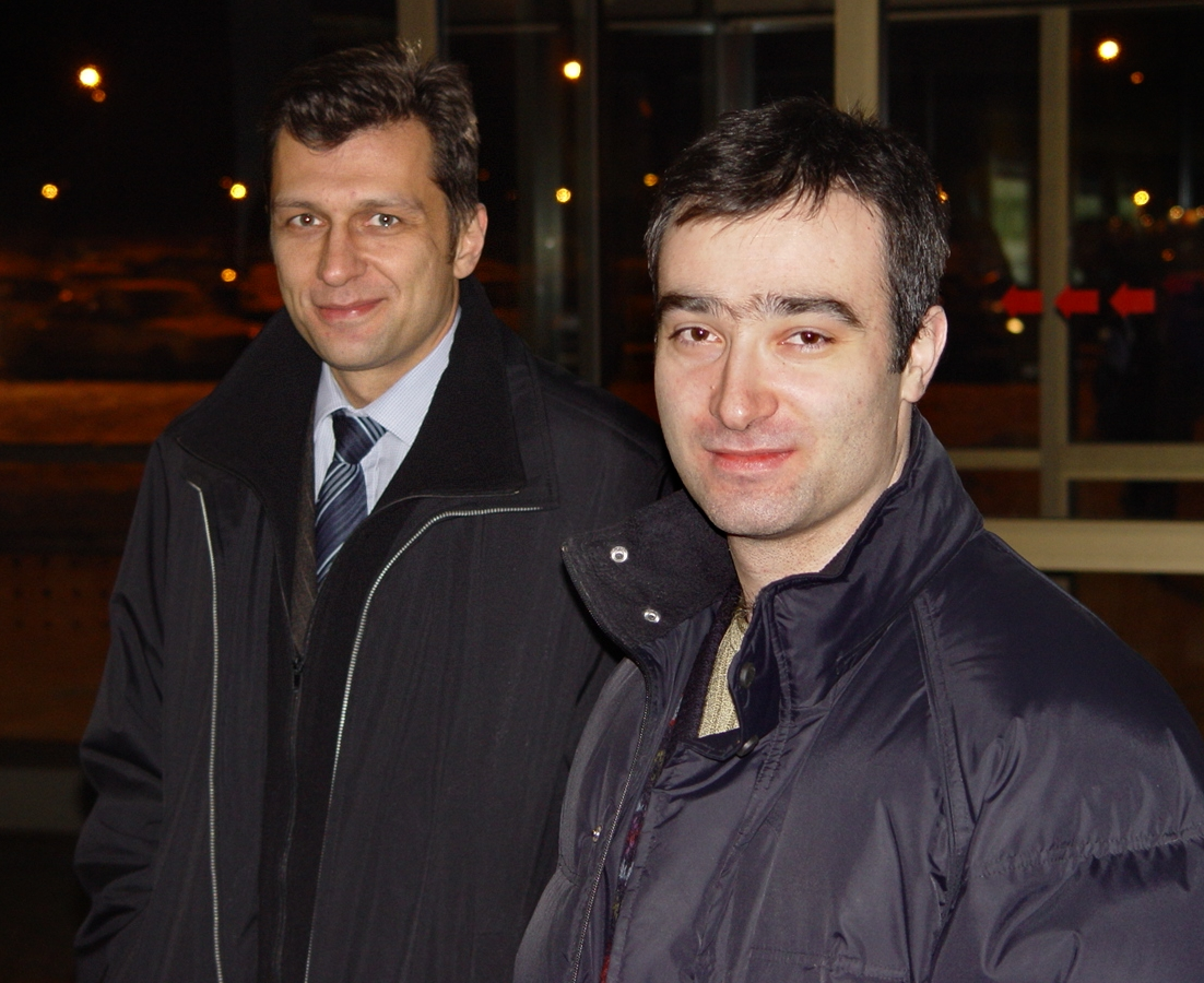 Бронислав Ермак и Артур Аракелян, МДМ-Банк, 2003.